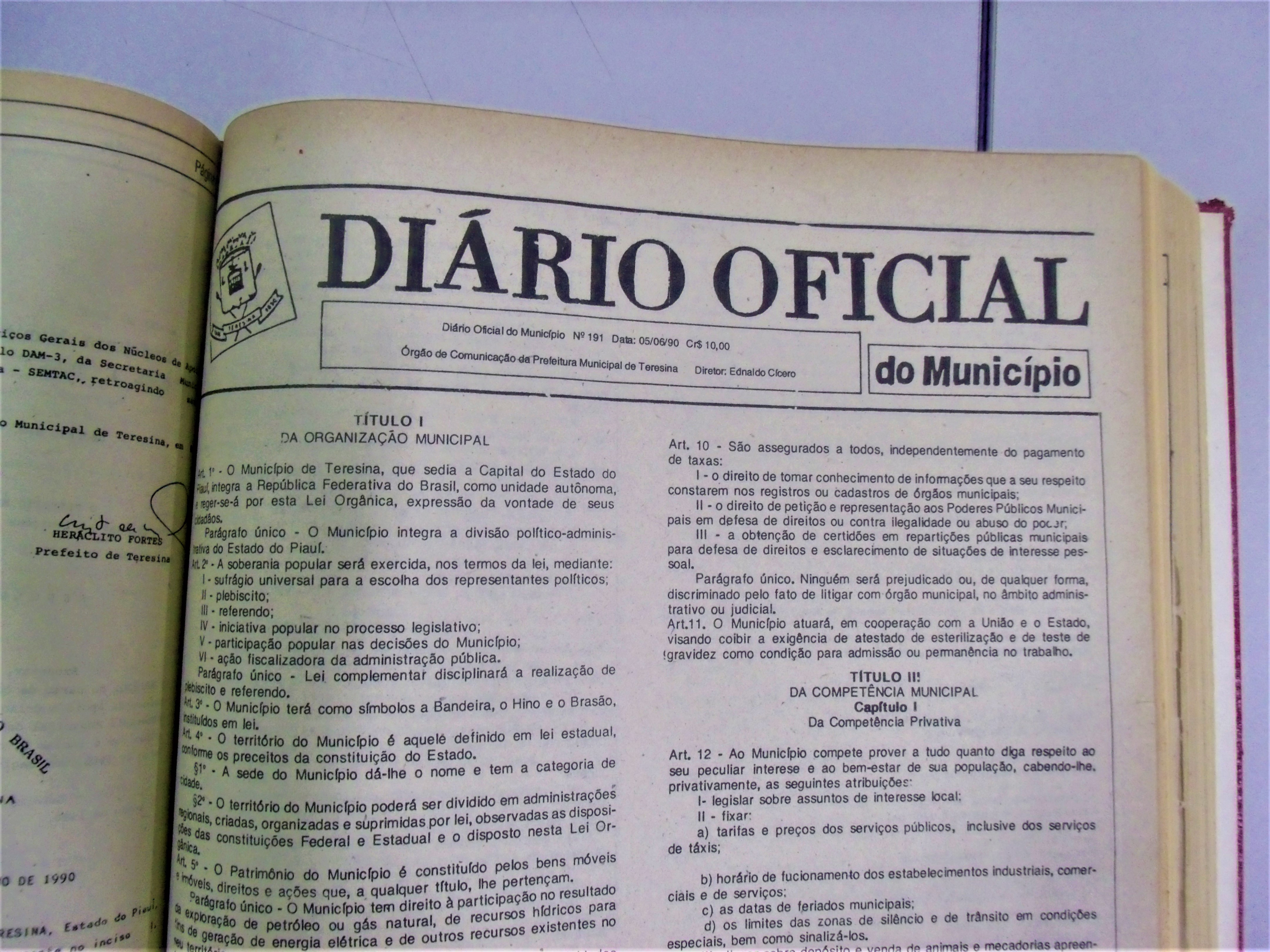 Edição do Diário Oficial de Teresina que republicou a Lei Orgânica do Município de Teresina em 5 de junho de 1990. A publicação anterior houve erros no texto e por isso foi republicada.